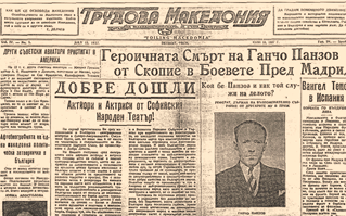 Трудова Македония